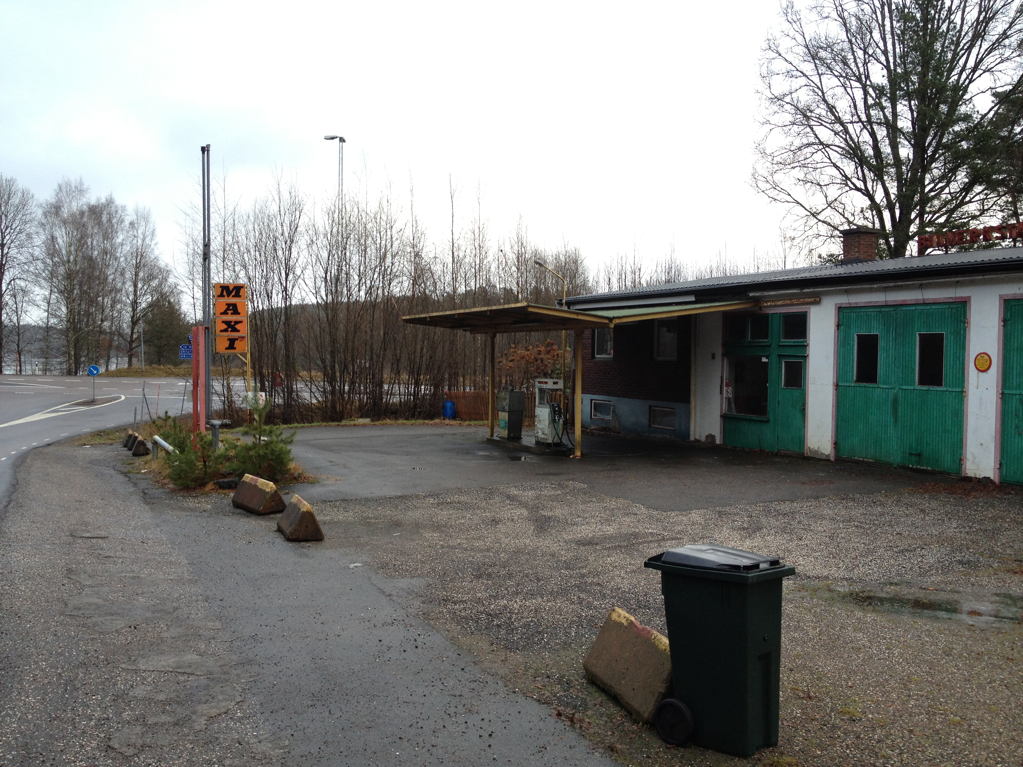 Maxi på Väg 156 mellan Landvetter och Skene.